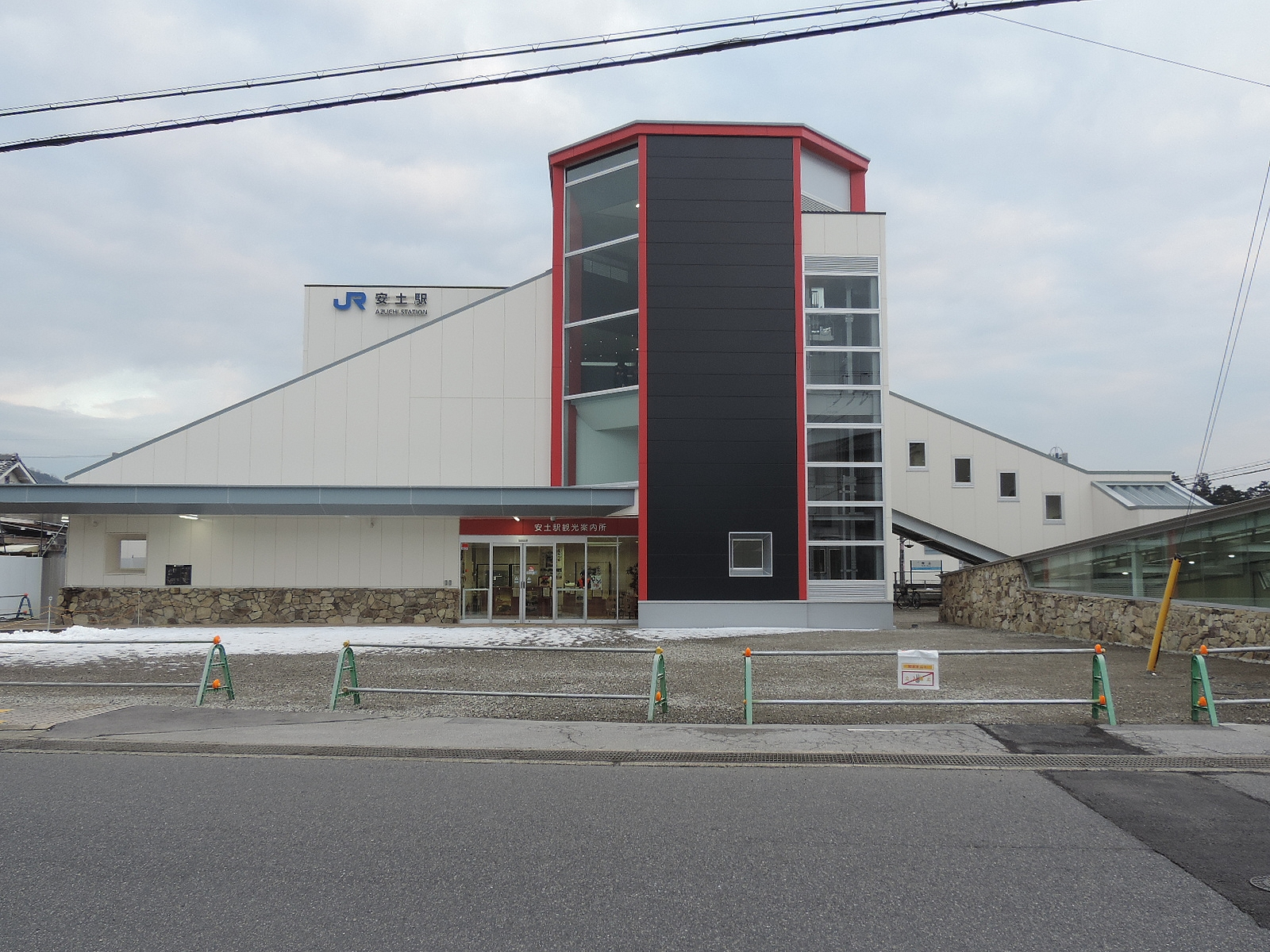 安土駅西口（2017年2月撮影）